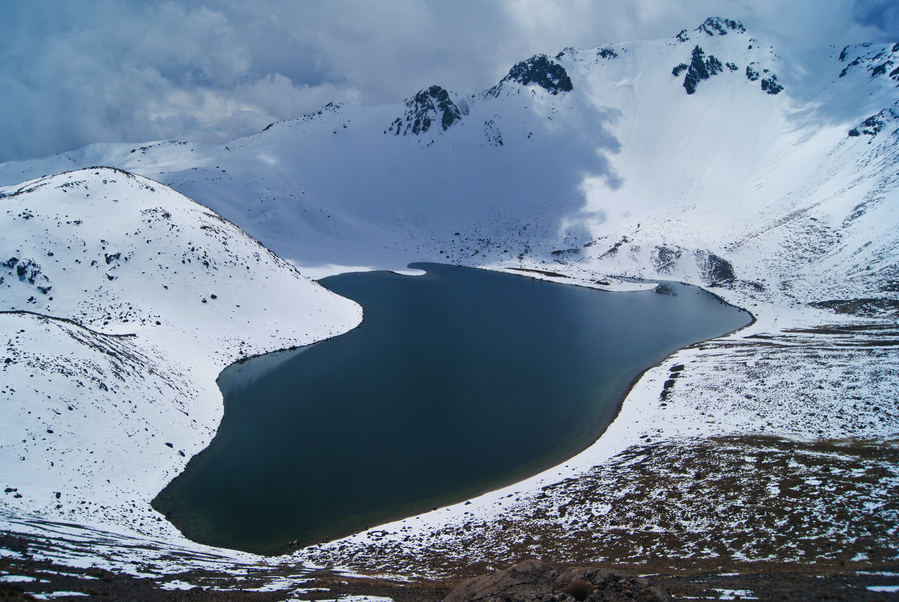 Laguna del sol en el cráter del Xinantécatl nevado.